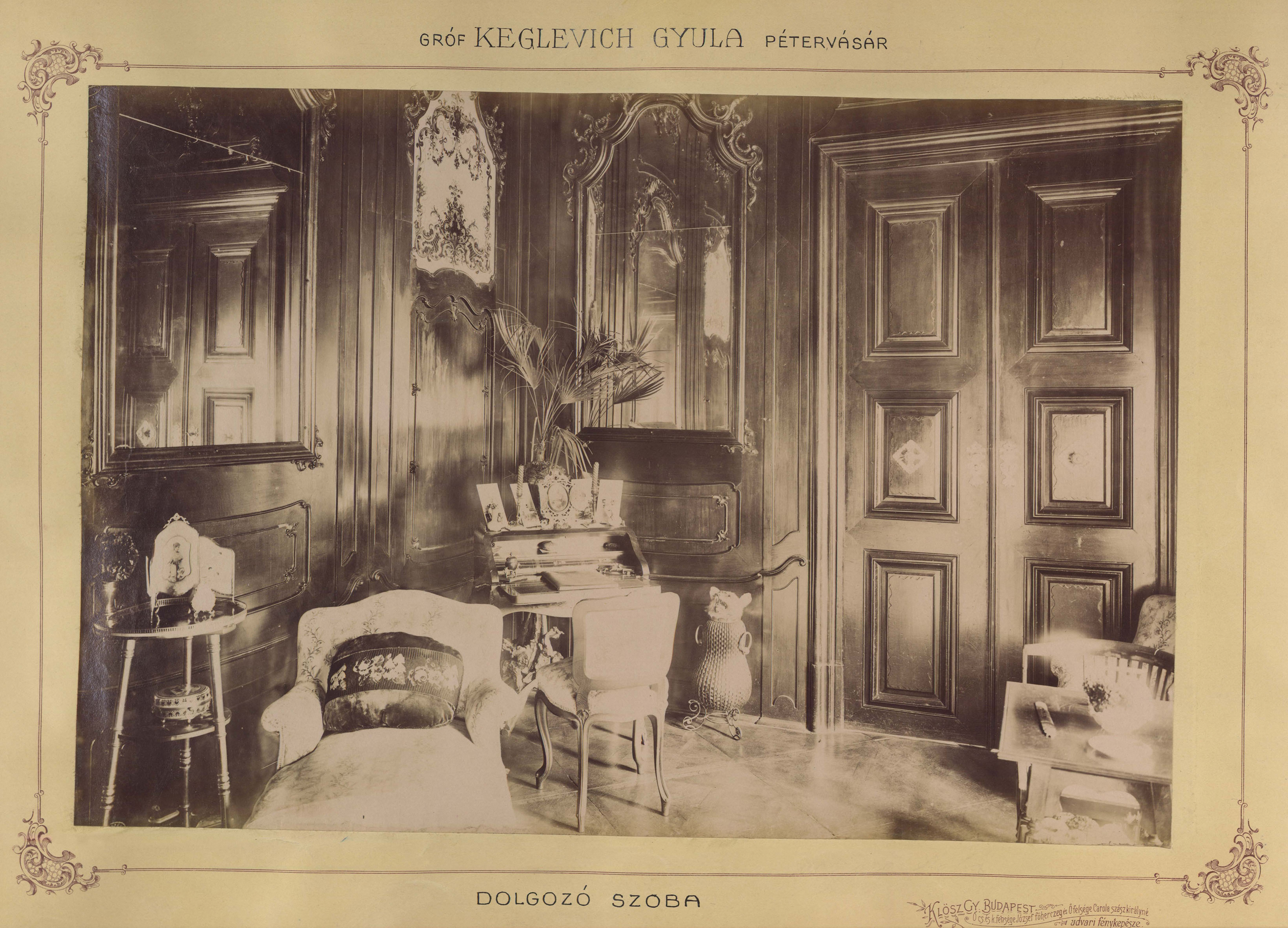 gróf Keglevich Gyula kastélyának dolgozószobája. A felvétel 1895-1899 között készült. A kép forrását kérjük így adja meg: Fortepan / Budapest Főváros Levéltára. Levéltári jelzet: HU.BFL.XV.19.d.1.12.052 Location: Hungary Tags: interior, mirror, wickerwork